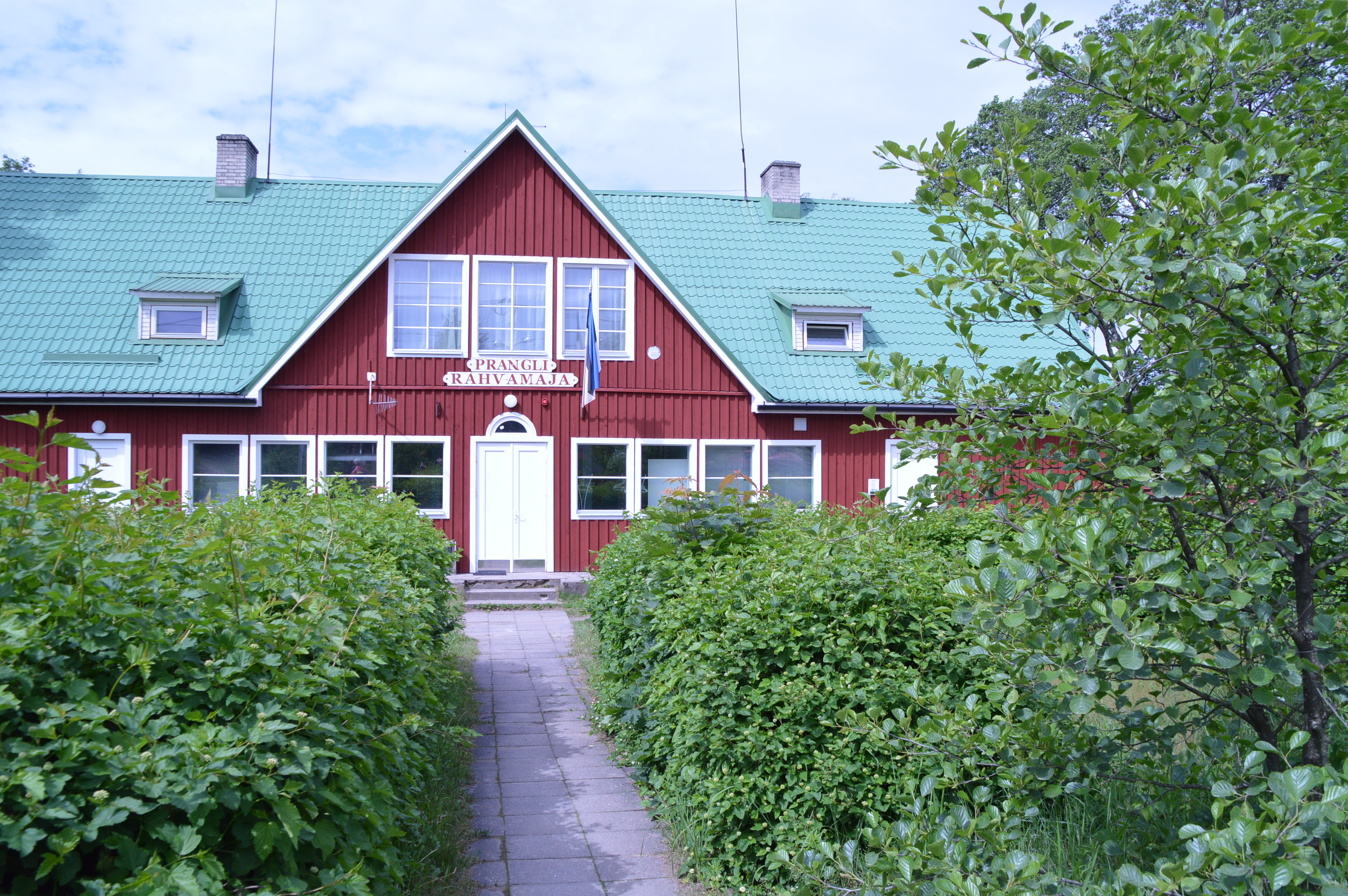 Prangli raamatukogu asub rahvamaja 2. korrusel